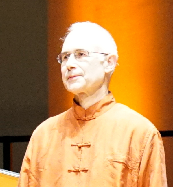 lors d'un concert au Conservatoire de musique de Reims.